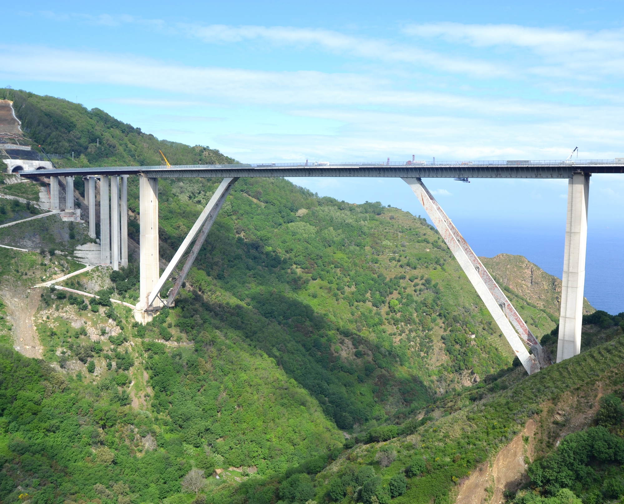 Viadotto Sfalassà (detto anche Ponte di Bagnara) sull'autostrada A3 in provincia di Reggio Calabria (la campata centrale in acciaio ha luce 376 m, altezza dal fondovalle alla sede stradale 253 metri)